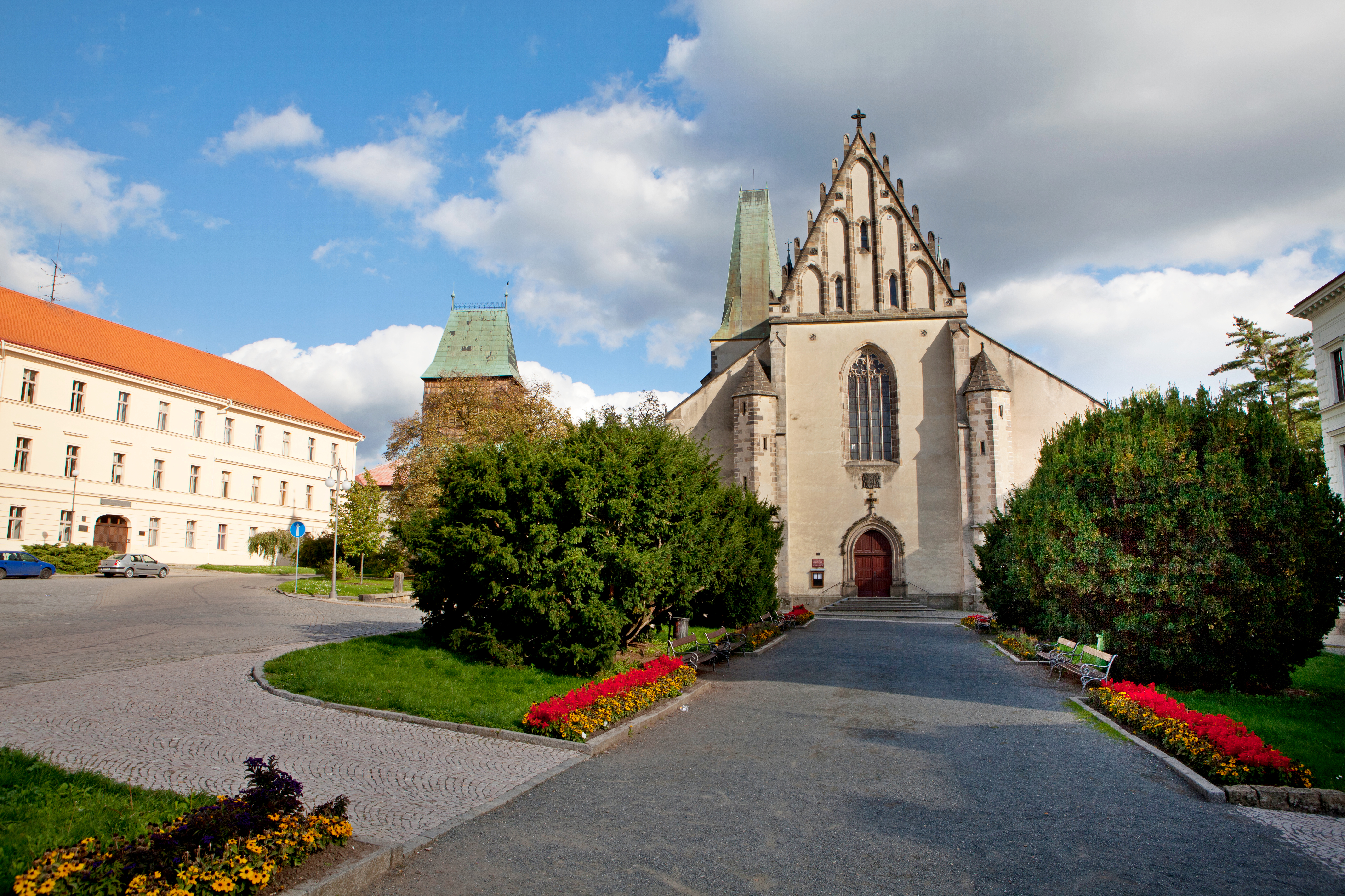 Kostel svatého Bartoloměje se zvonicí, Rakovník, Žižkovo náměstí